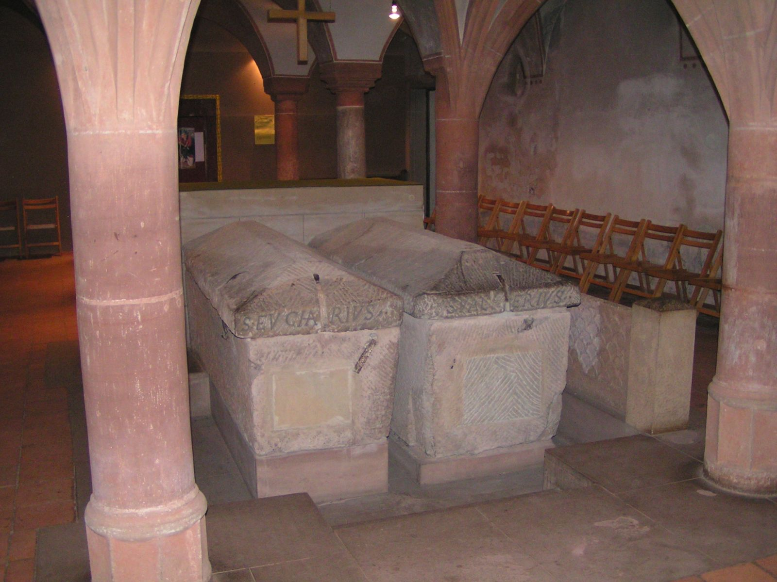 Trier, Benediktinerabtei St.Matthias, die Gräber von Eucharius und Valerias